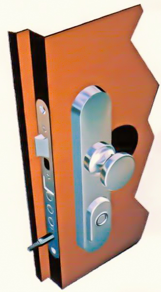 Pohled na namontovaný zámek Harpyje